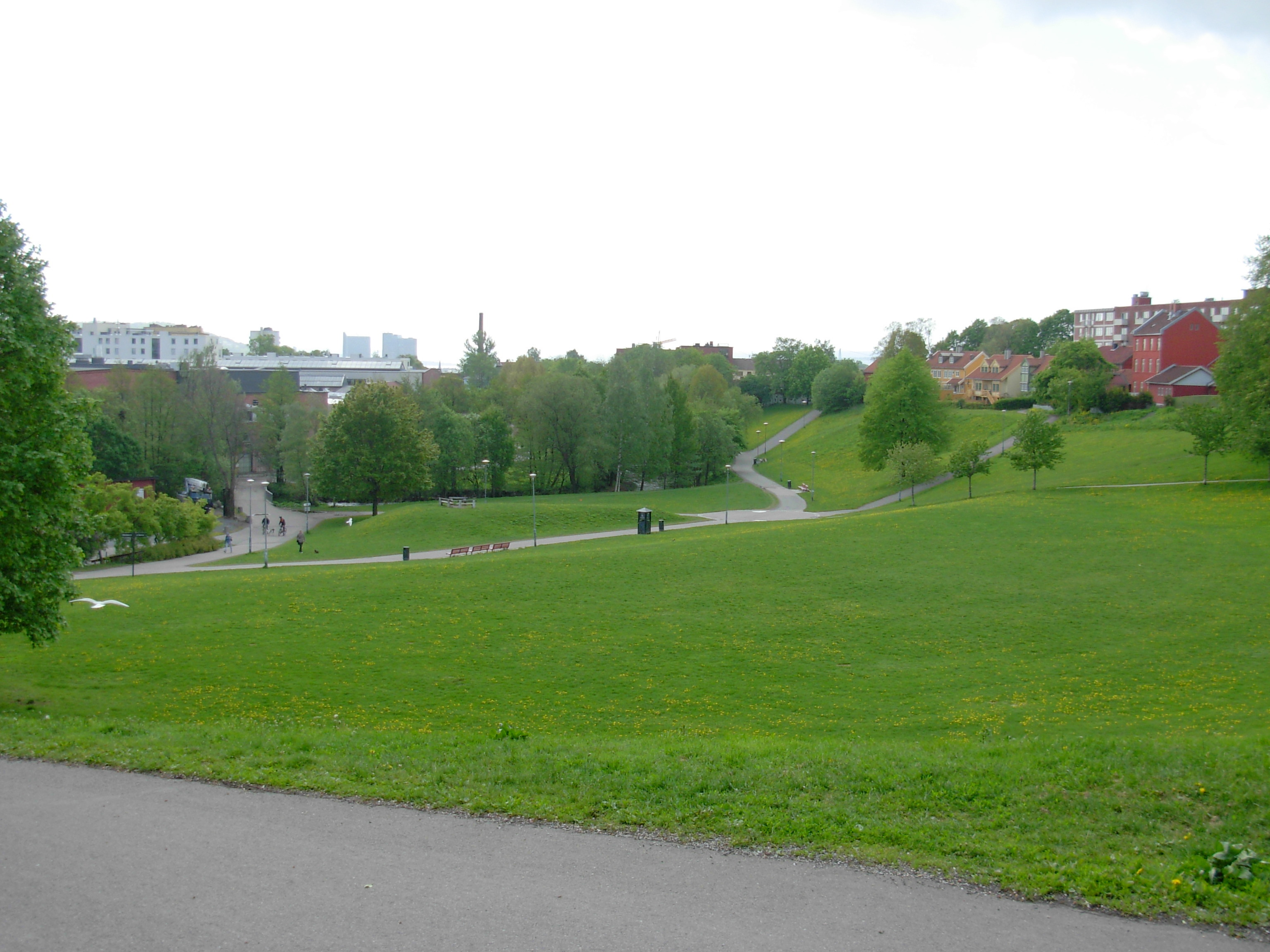 Myraløkka, Sagene, Norway, seen from Arendalsgata